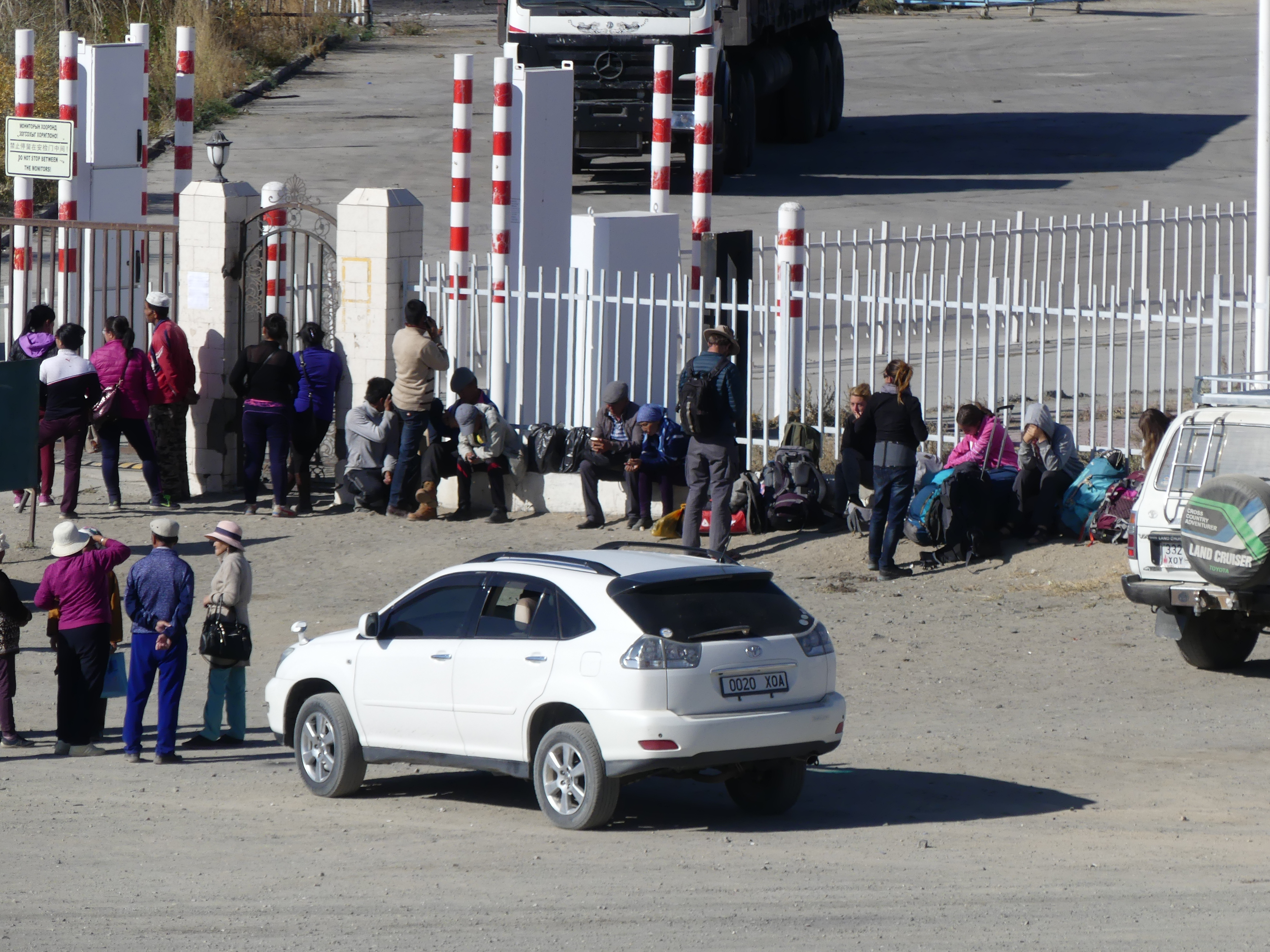 La frontière terrestre entre la Mongolie et la Chine à proximité de Burenkhairkhan, Mongolie. Des touristes et des locaux patientent pour pouvoir la franchir.